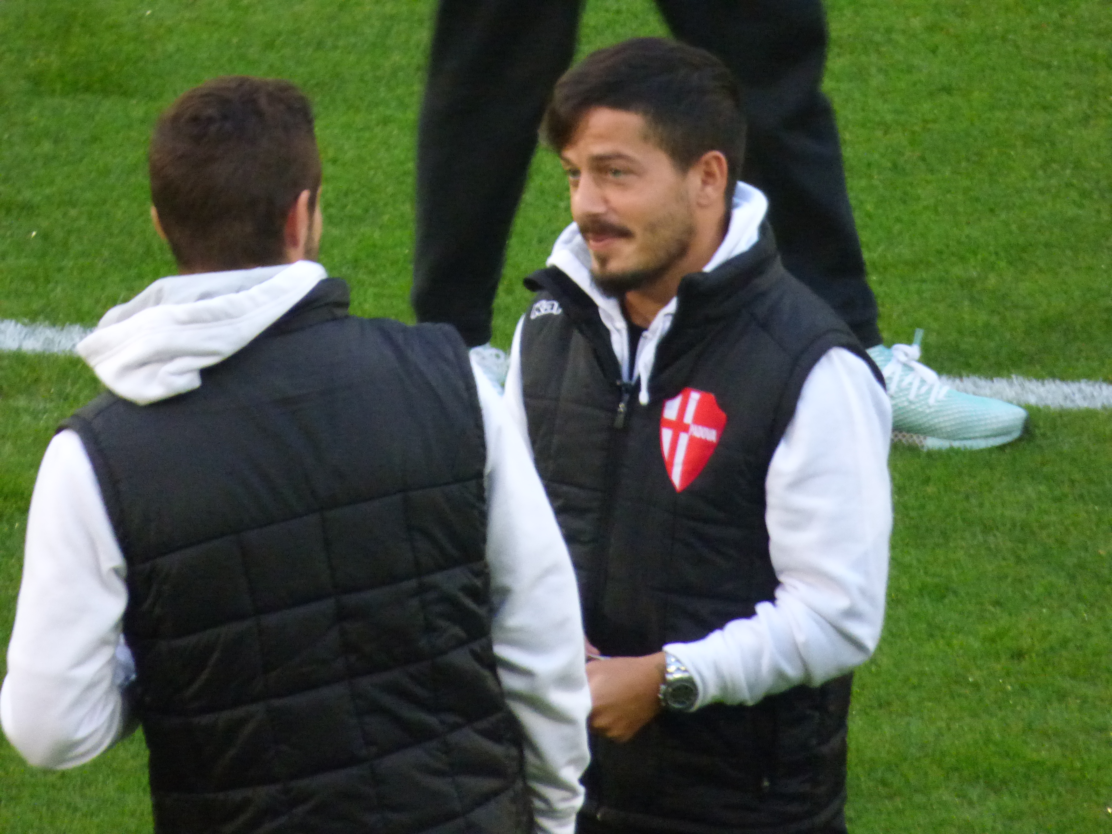 Vincenzo Sarno lors du match amical RC Lens - Calcio Padova, le 11 octobre 2018 au Stade Bollaert-Delelis de Lens.